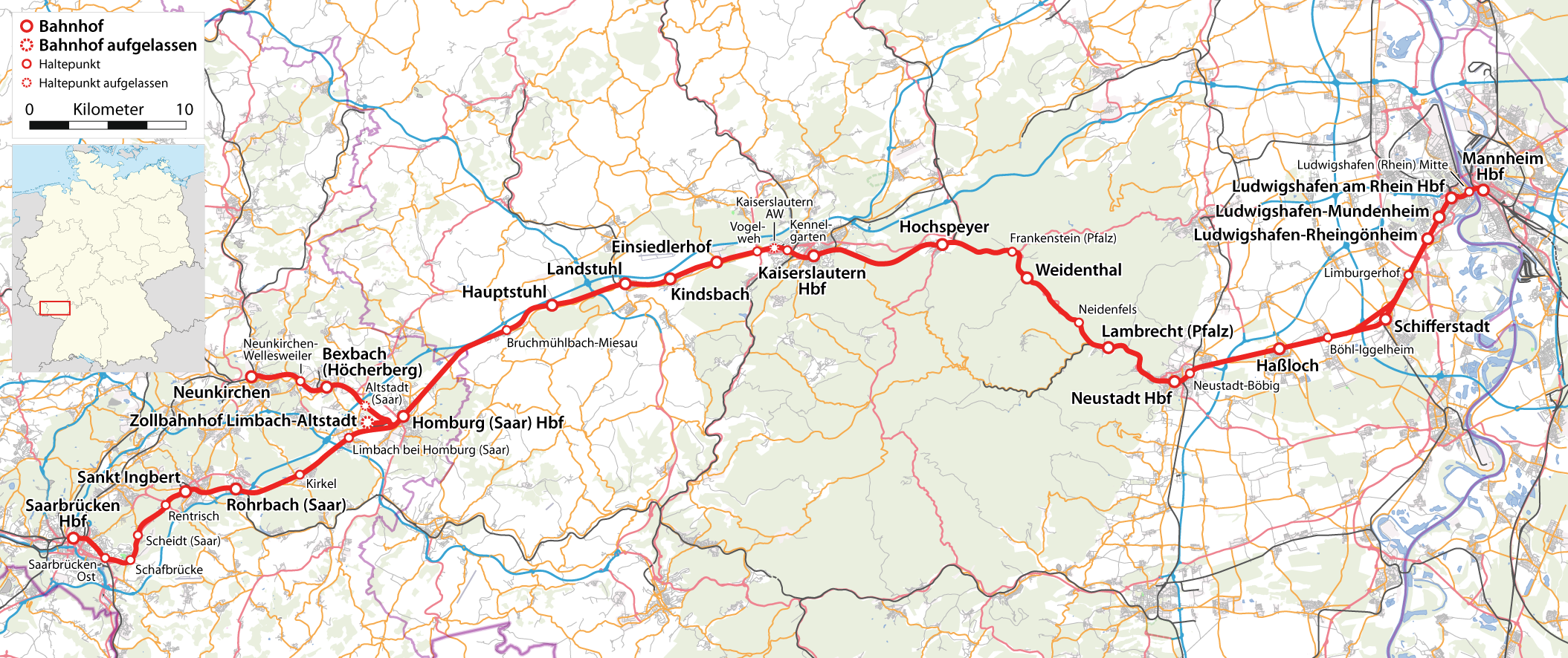 Streckenkarte der Pfälzischen Ludwigsbahn